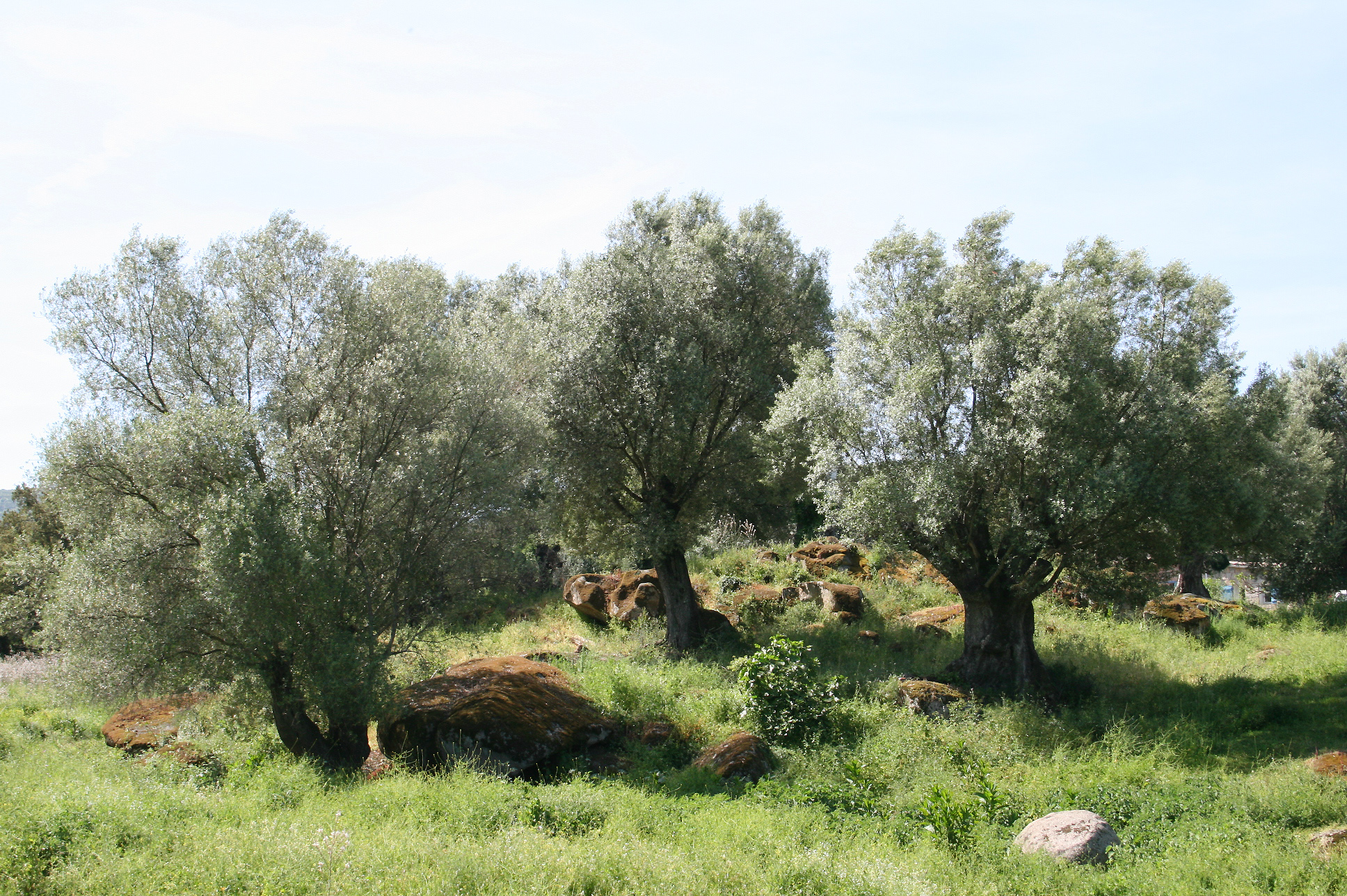 Filitosa France (Corse-du-Sud), vieux oliviers à l'entrée du site.